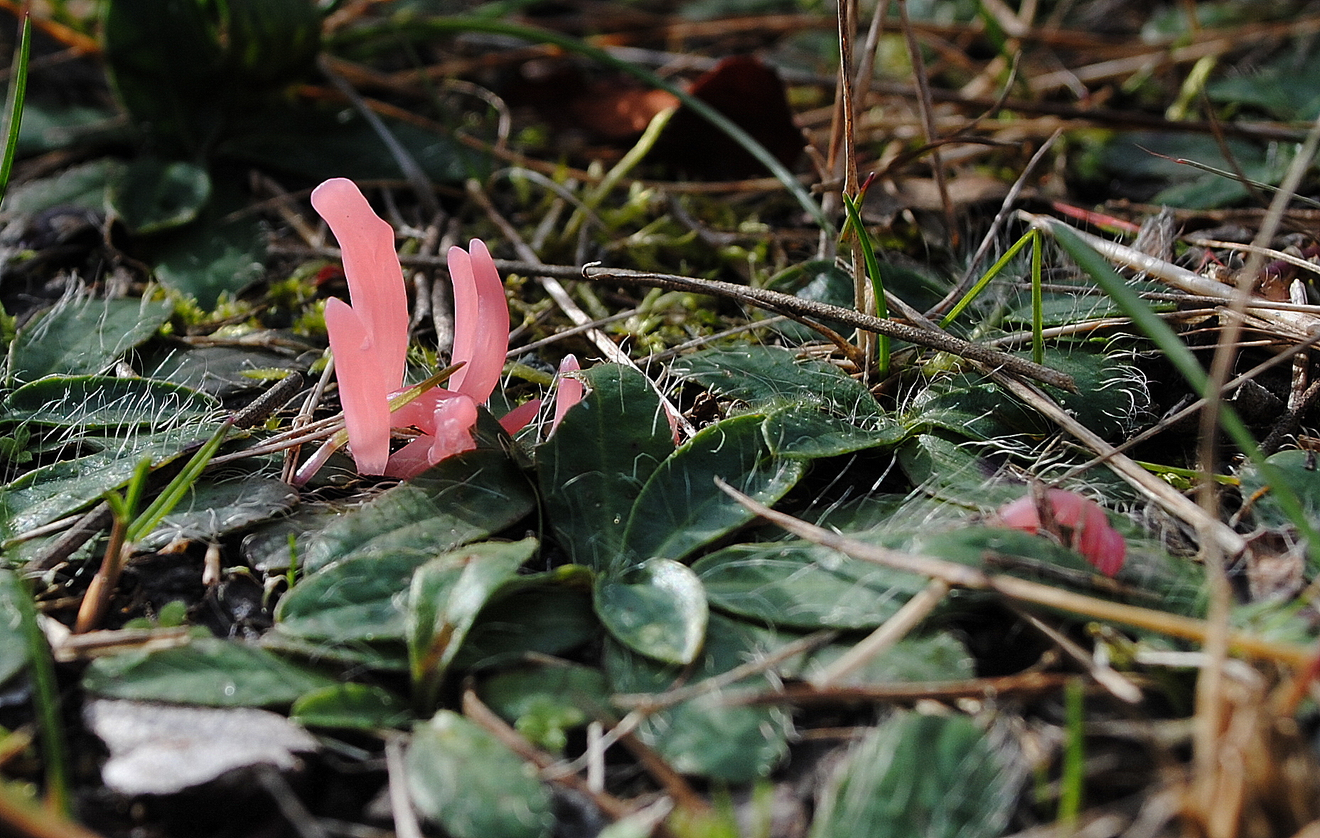 Grupa owocników Clavaria rosea, pierwsze stanowisko gatunku w Polsce